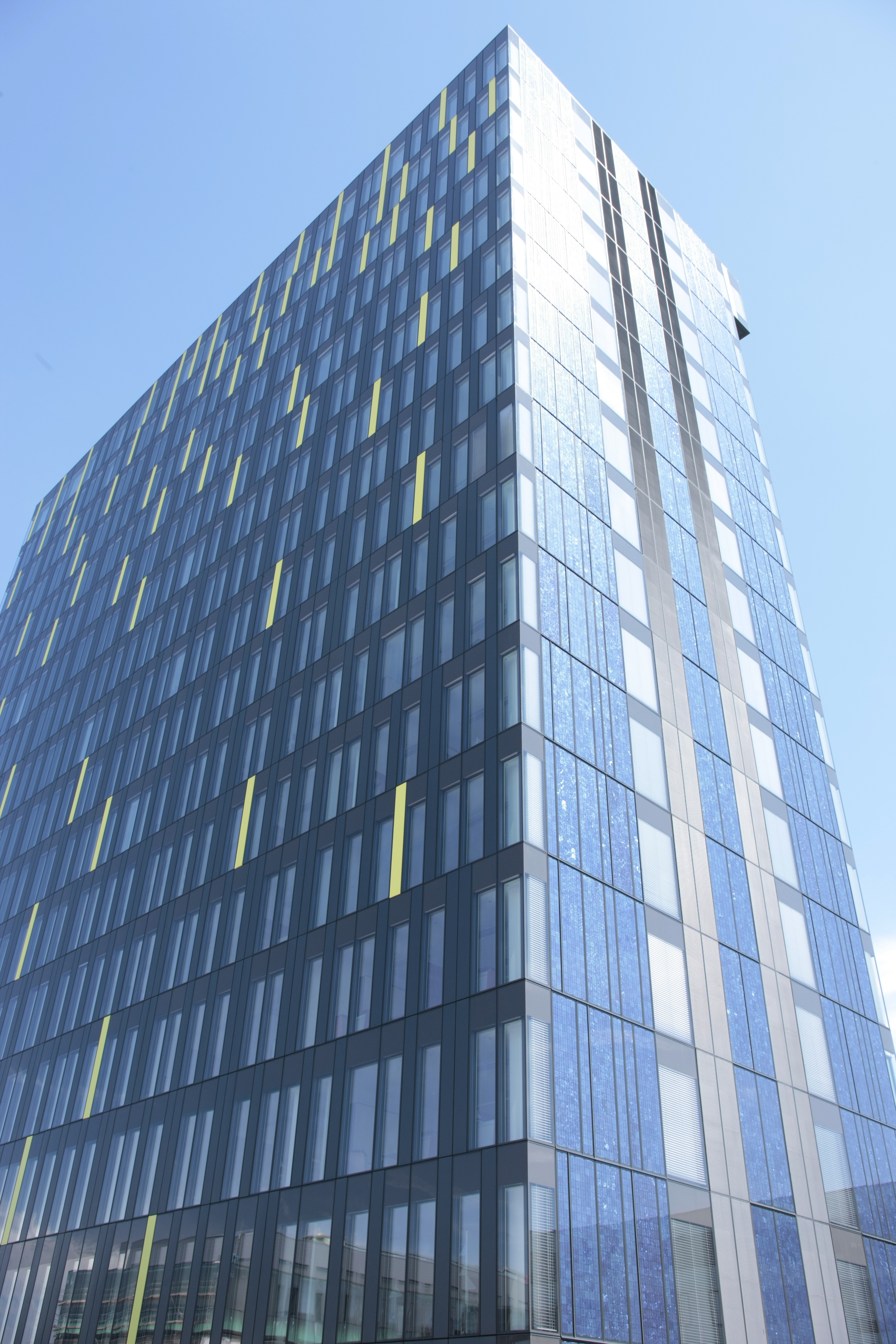 Der Power Tower der Energie AG mit energieeffizienter Gebäudehülle.